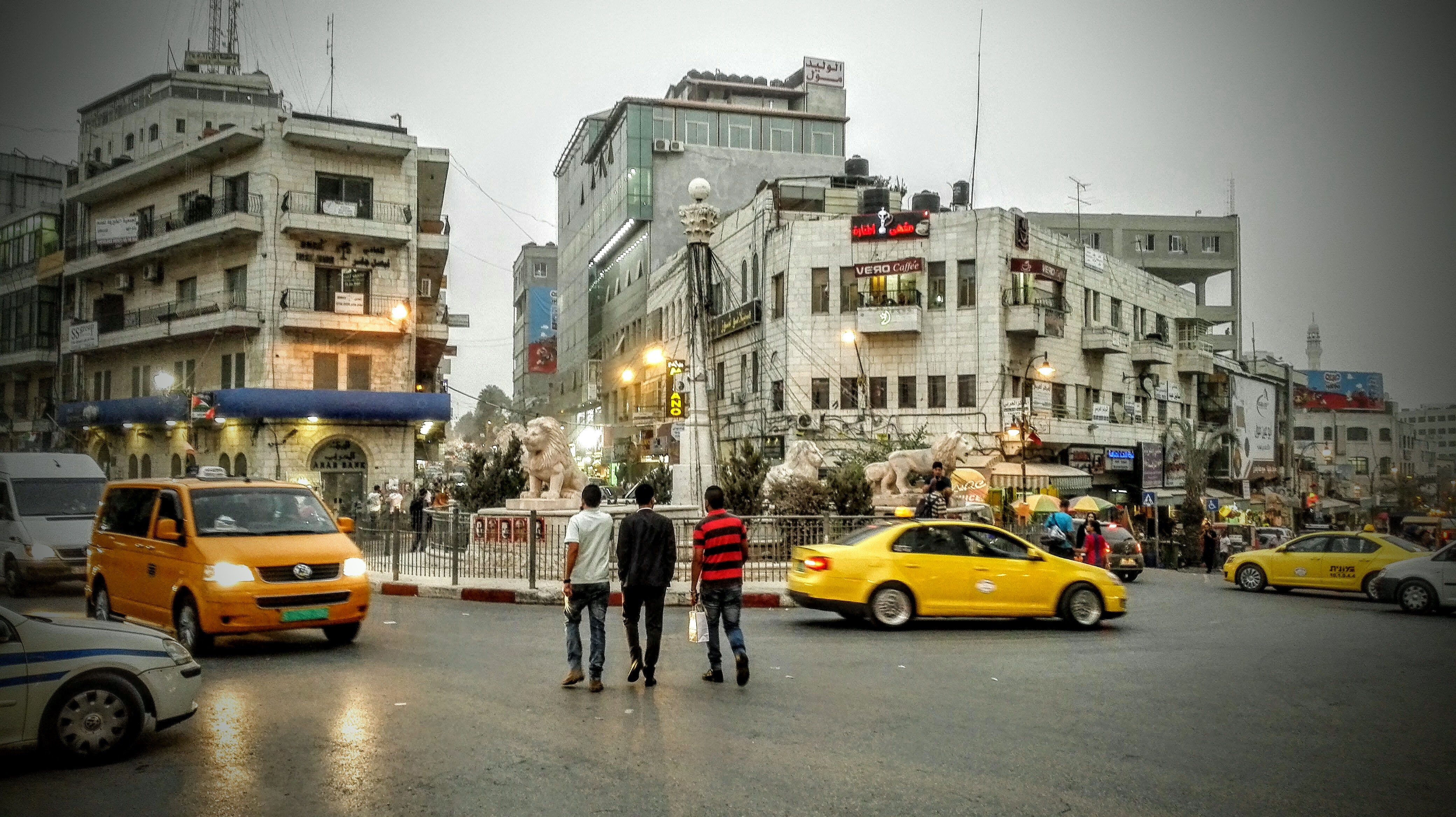 Place Al-Manara, Ramallah